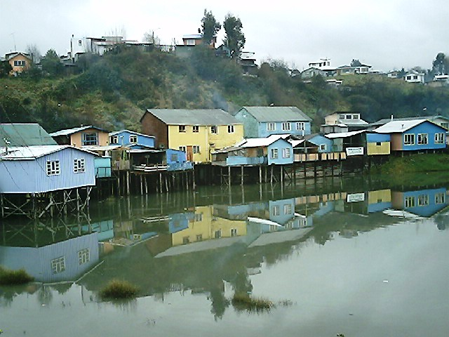 Palafitos en el sector Punta de Diamante, Castro, (Chile).